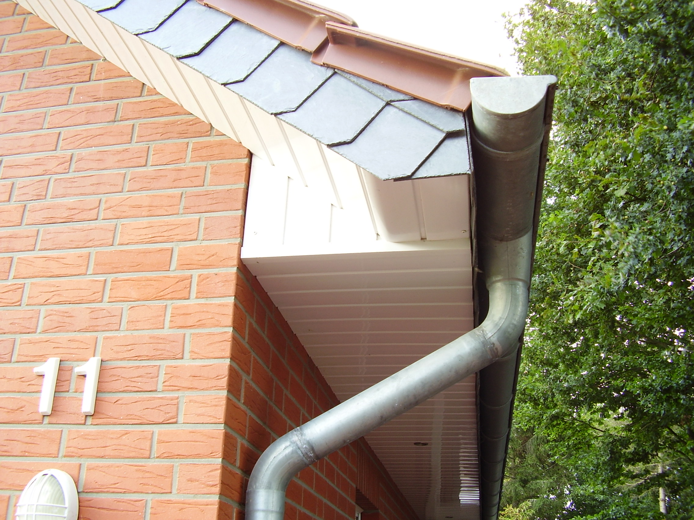 Dachkasten roof, house